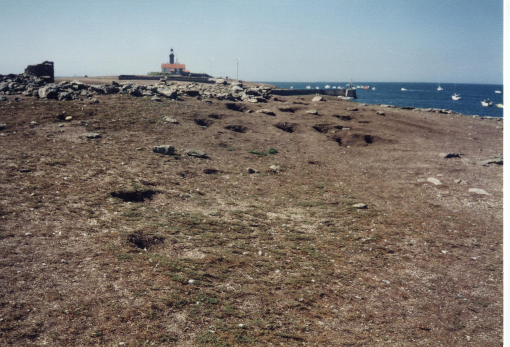 Photo prise en 1996